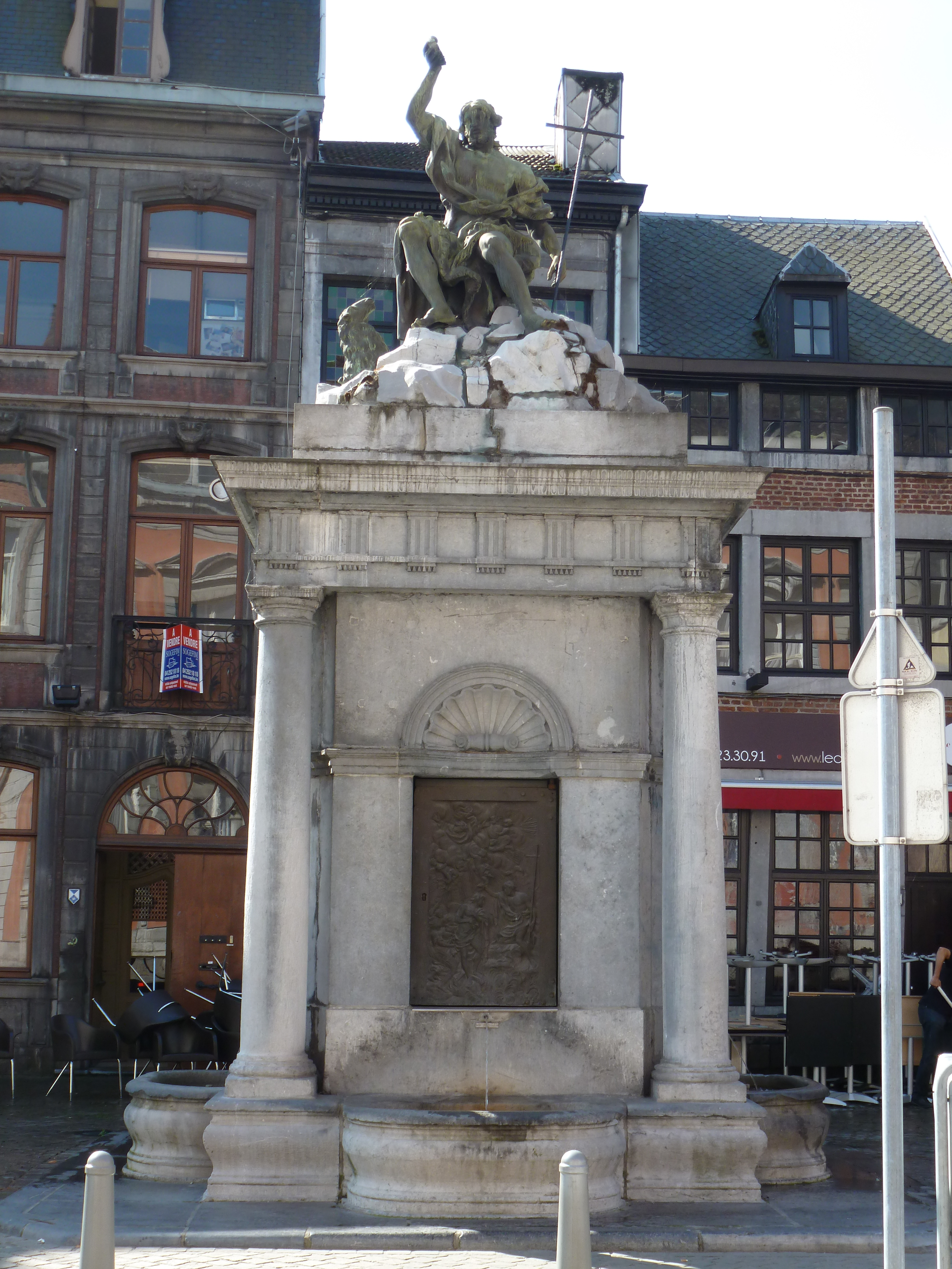 située rue Hors-Château - œuvre de Delcourt